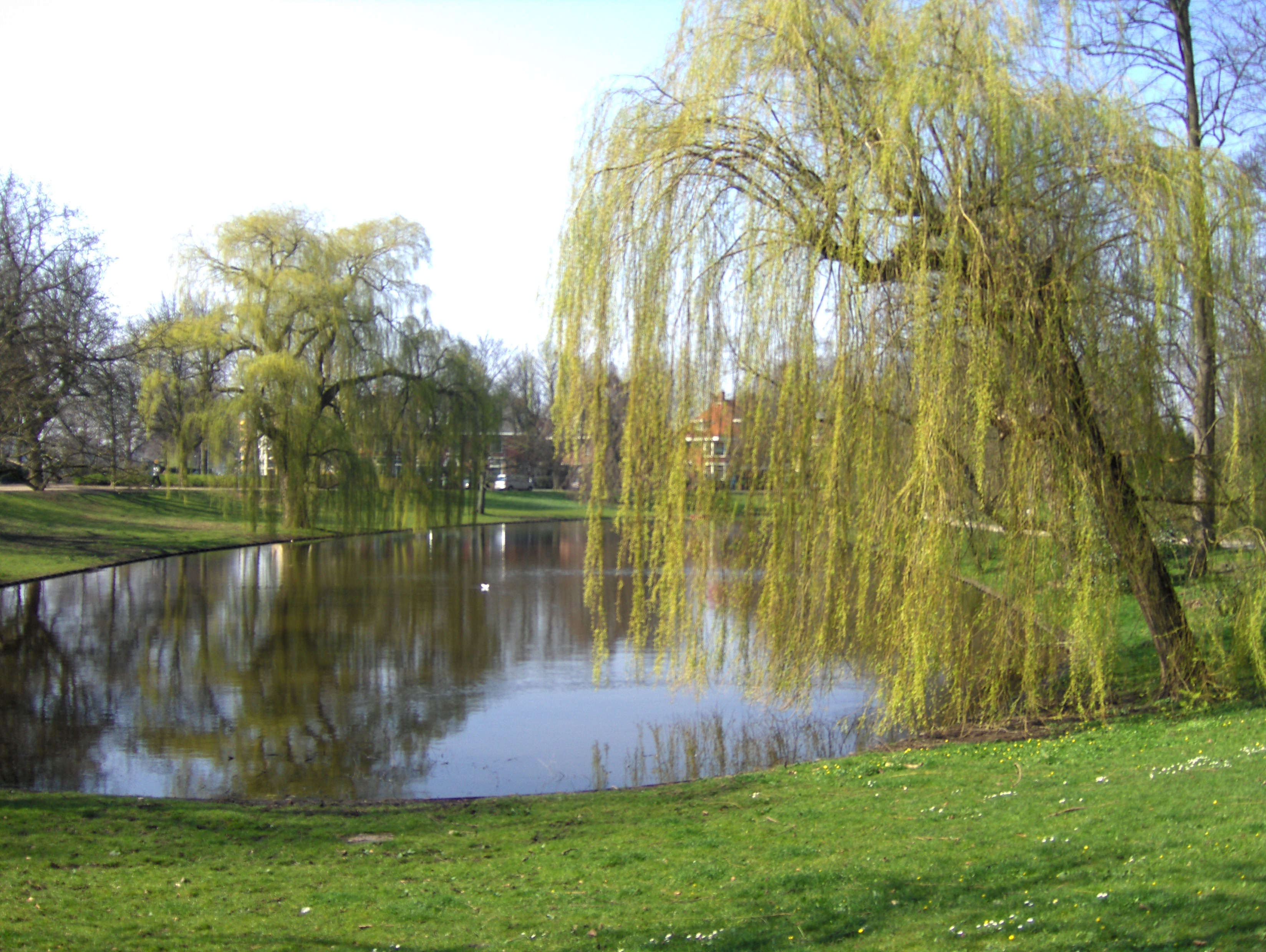 Vijver, Noorderplantsoen, Groningen.